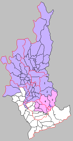 京都府宇治郡の町村制時点の町村。